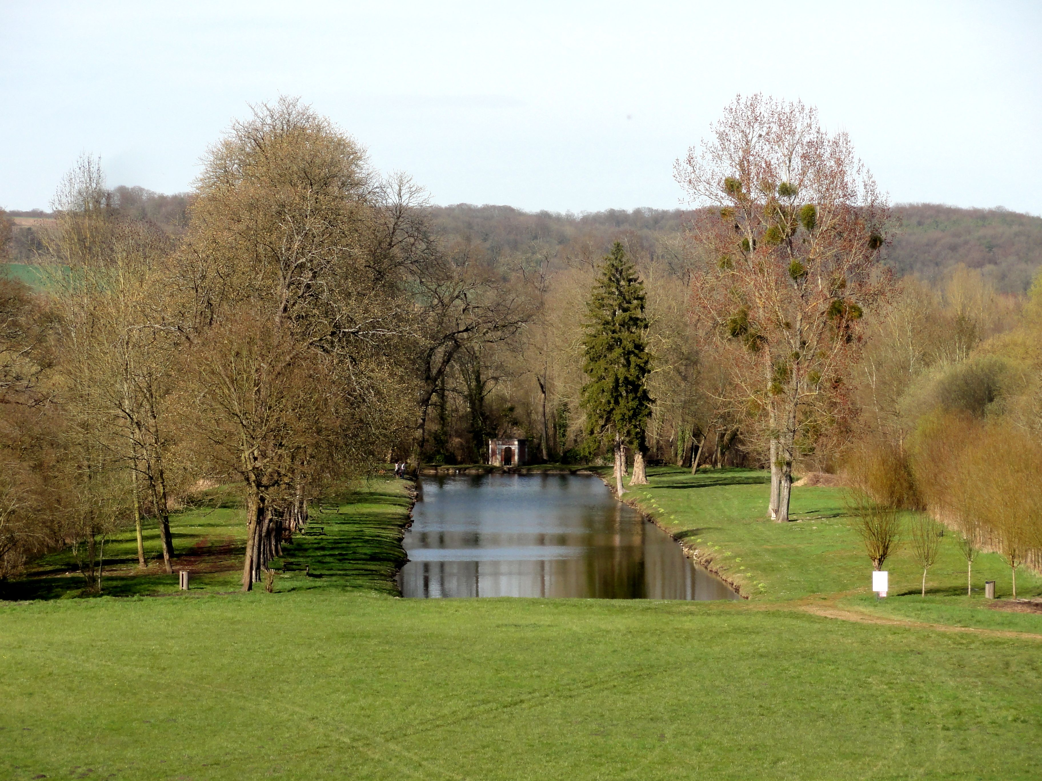 Canal et pavillon au parc.